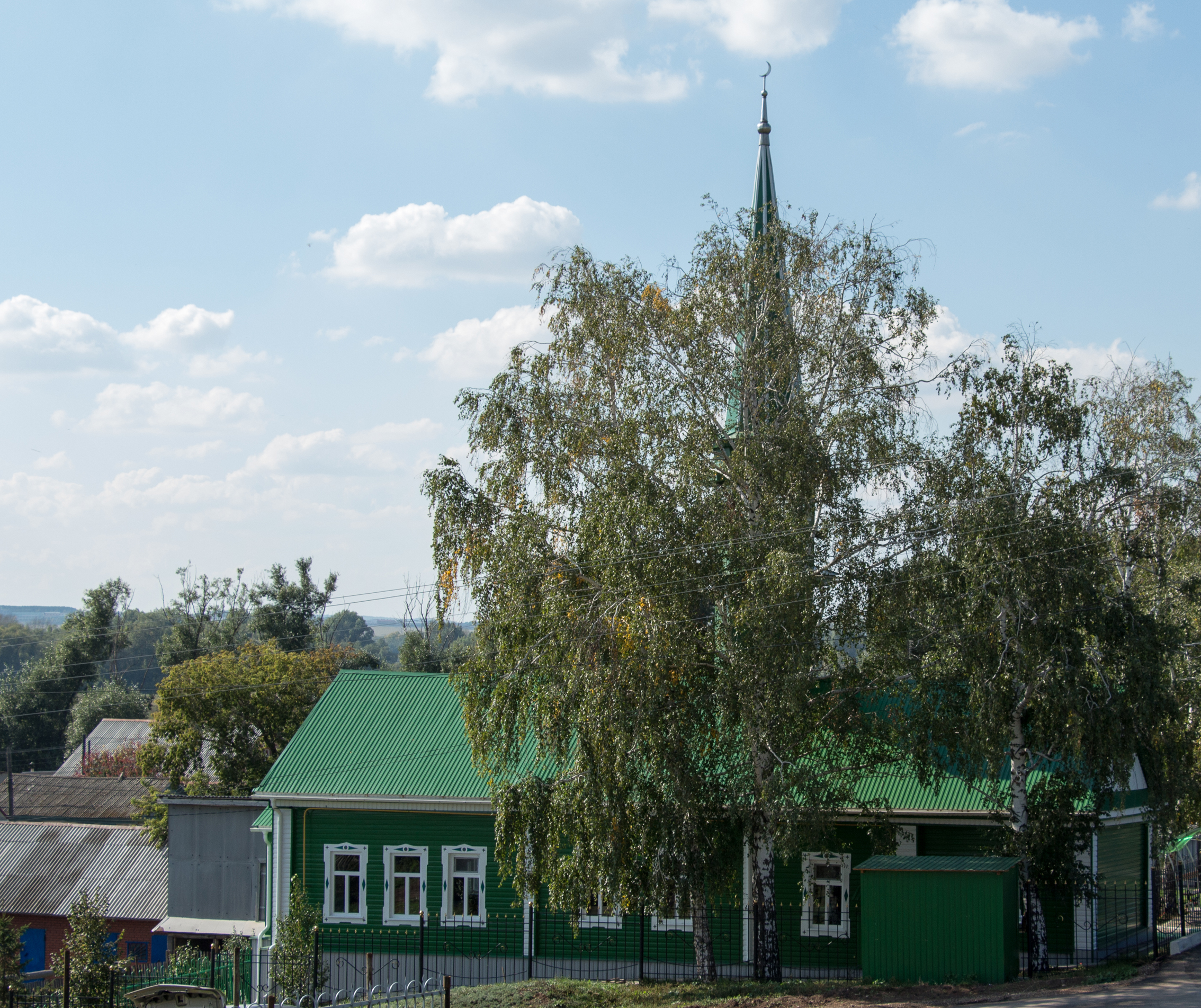 (Республика Башкортостан, Туймазы, село Зигитяк)